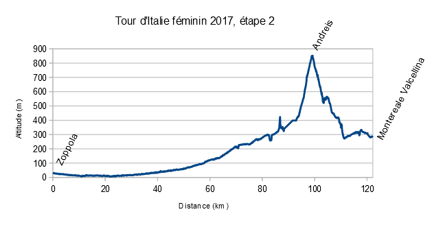 Profil de la 2e étape du Tour d'Italie féminin 2017